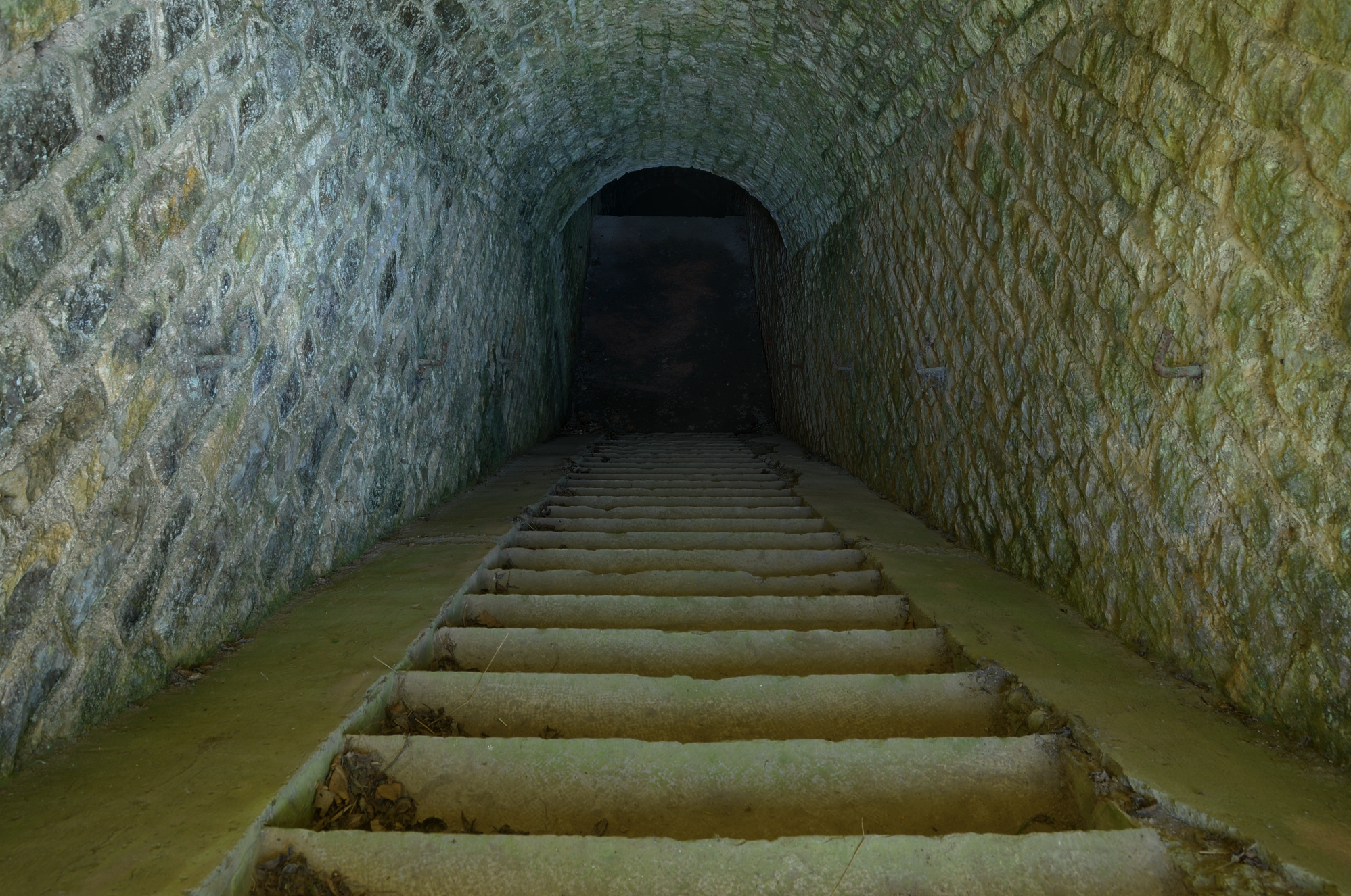 Accès au coffre de contrescarpe Sud-Ouest. Basses perches fortifications.